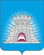 Герб городского поселения Зарайск